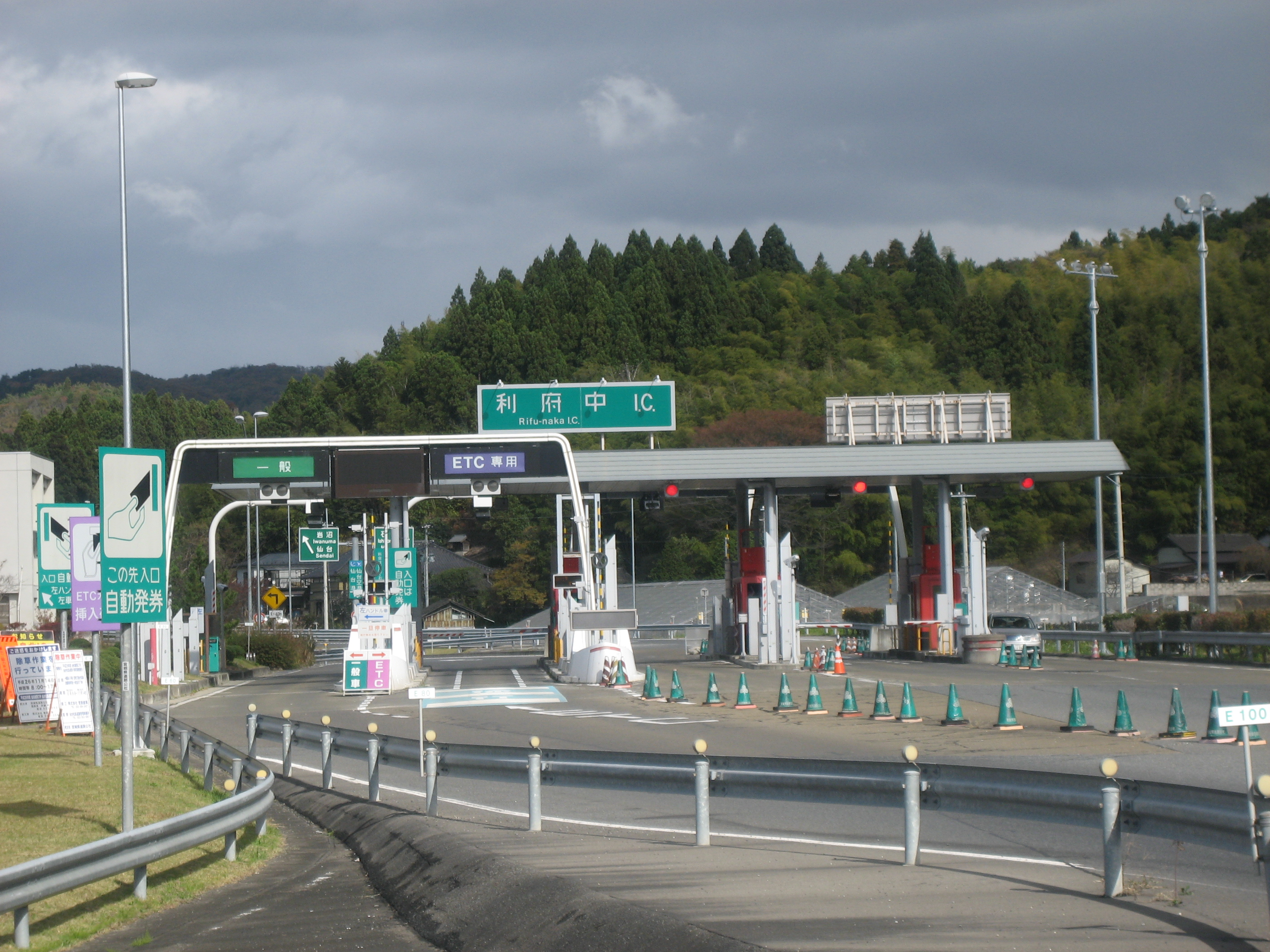 三陸自動車道利府中インターチェンジ料金所